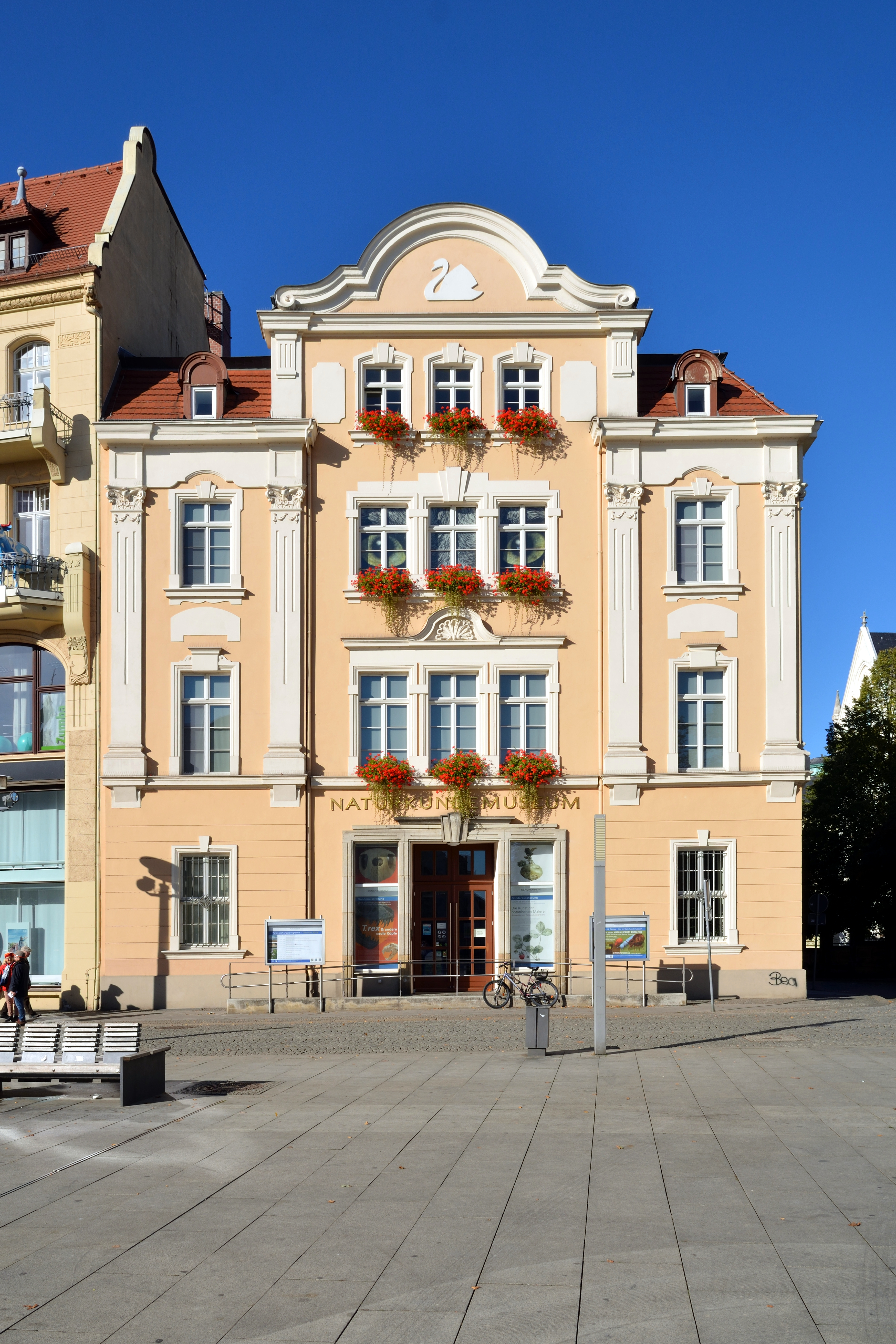 Impressionen einer GLAM on Tour (2018) im Senckenberg Museum für NaturkundeHier: Das Gebäude des Museums in Görlitz